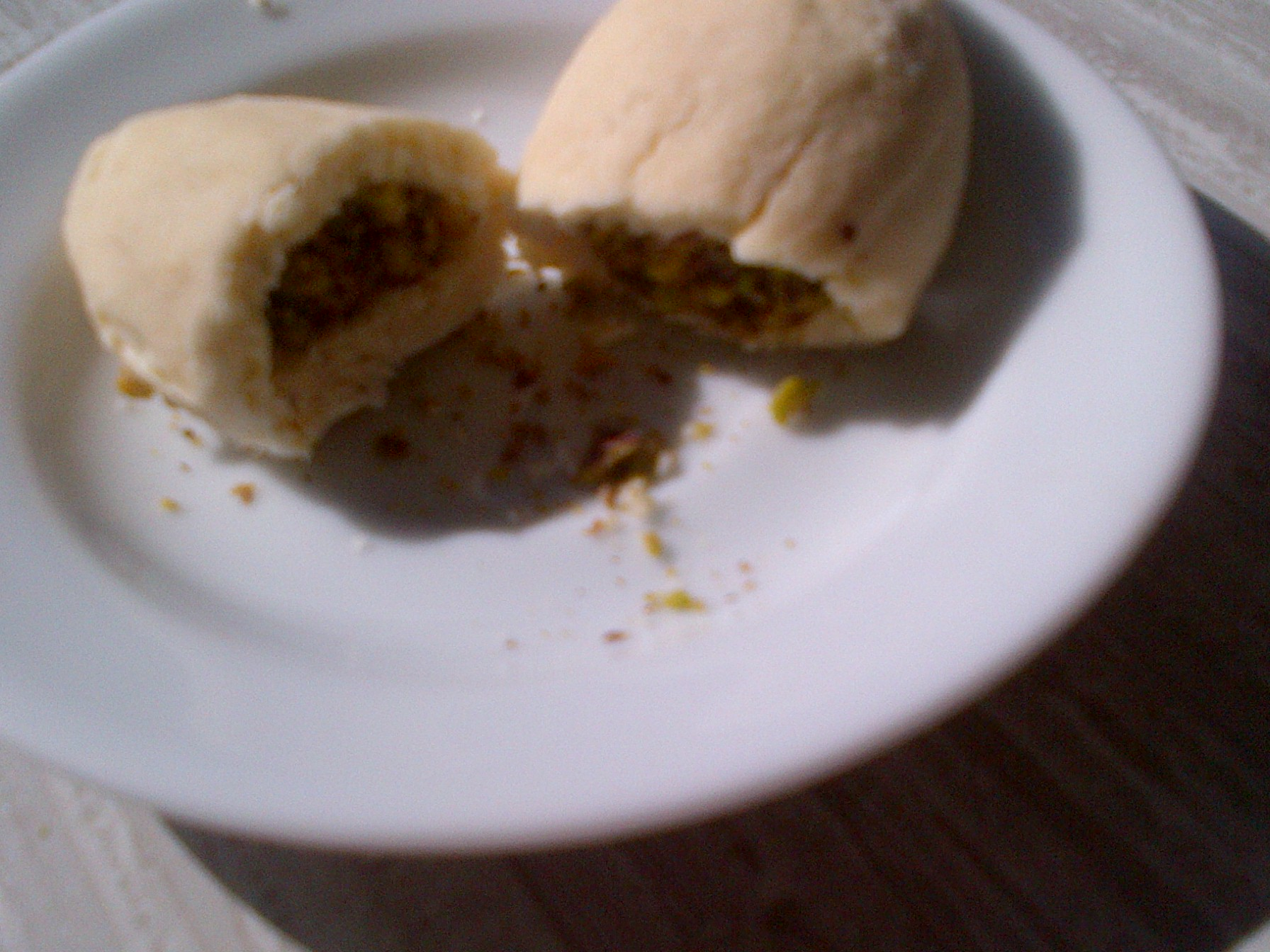 Besni kurabiyesi (detalle).